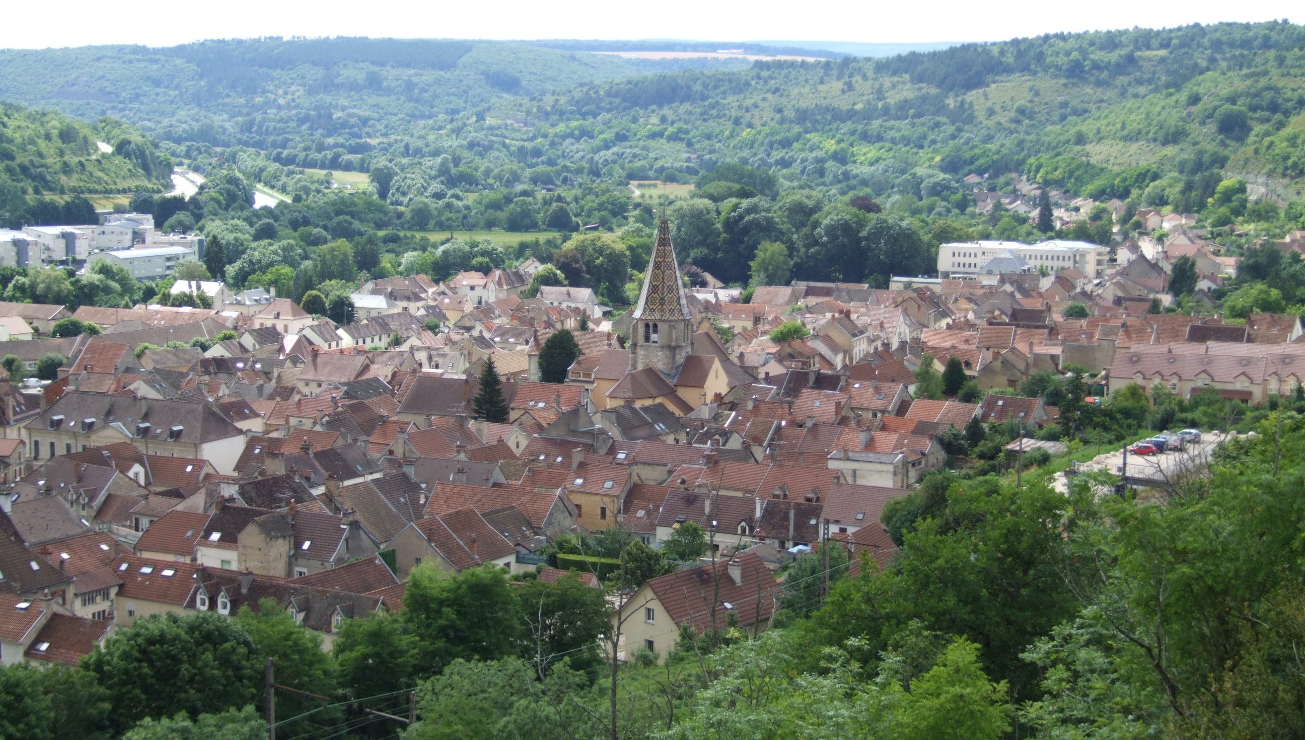 Plombières-lès-Dijon, Côte-d'Or, Bourgogne, FRANCE